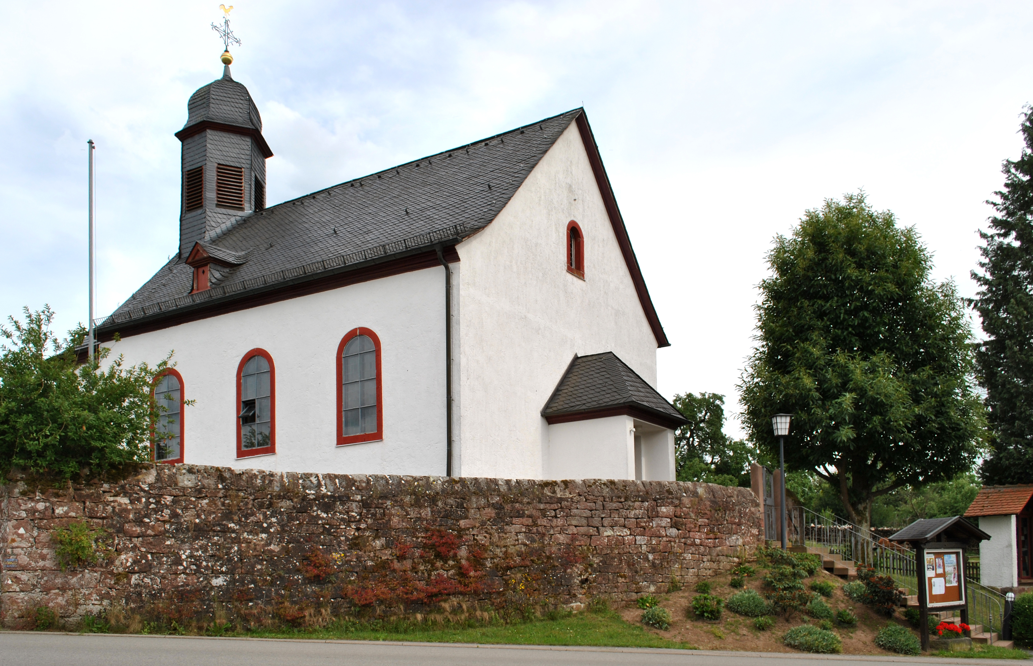 Katholische Pfarrkirche St. Luzia und St. Odilia in Hesseneck